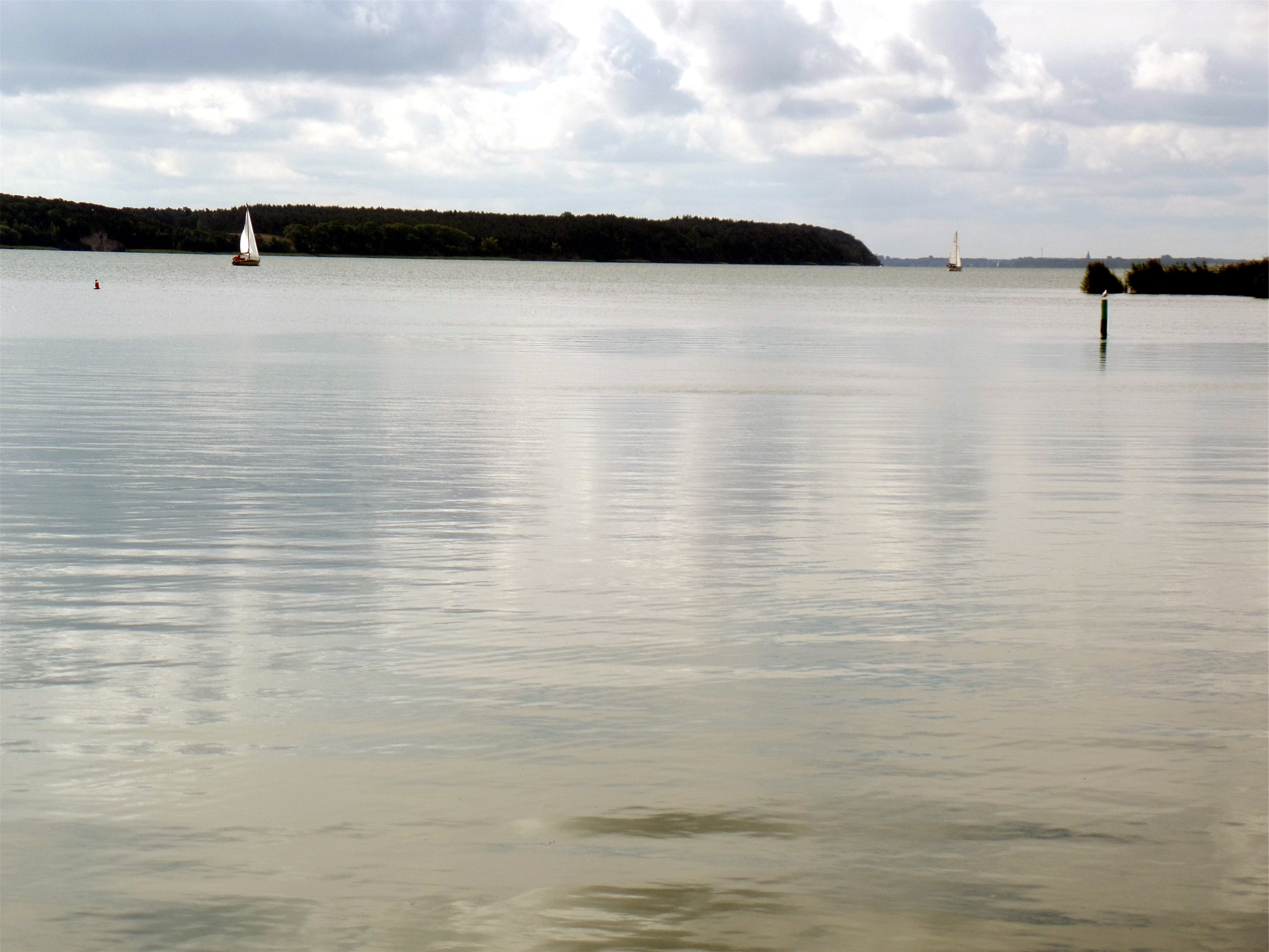 Blick aus dem Naturhafen Krummin in Richtung Lassan